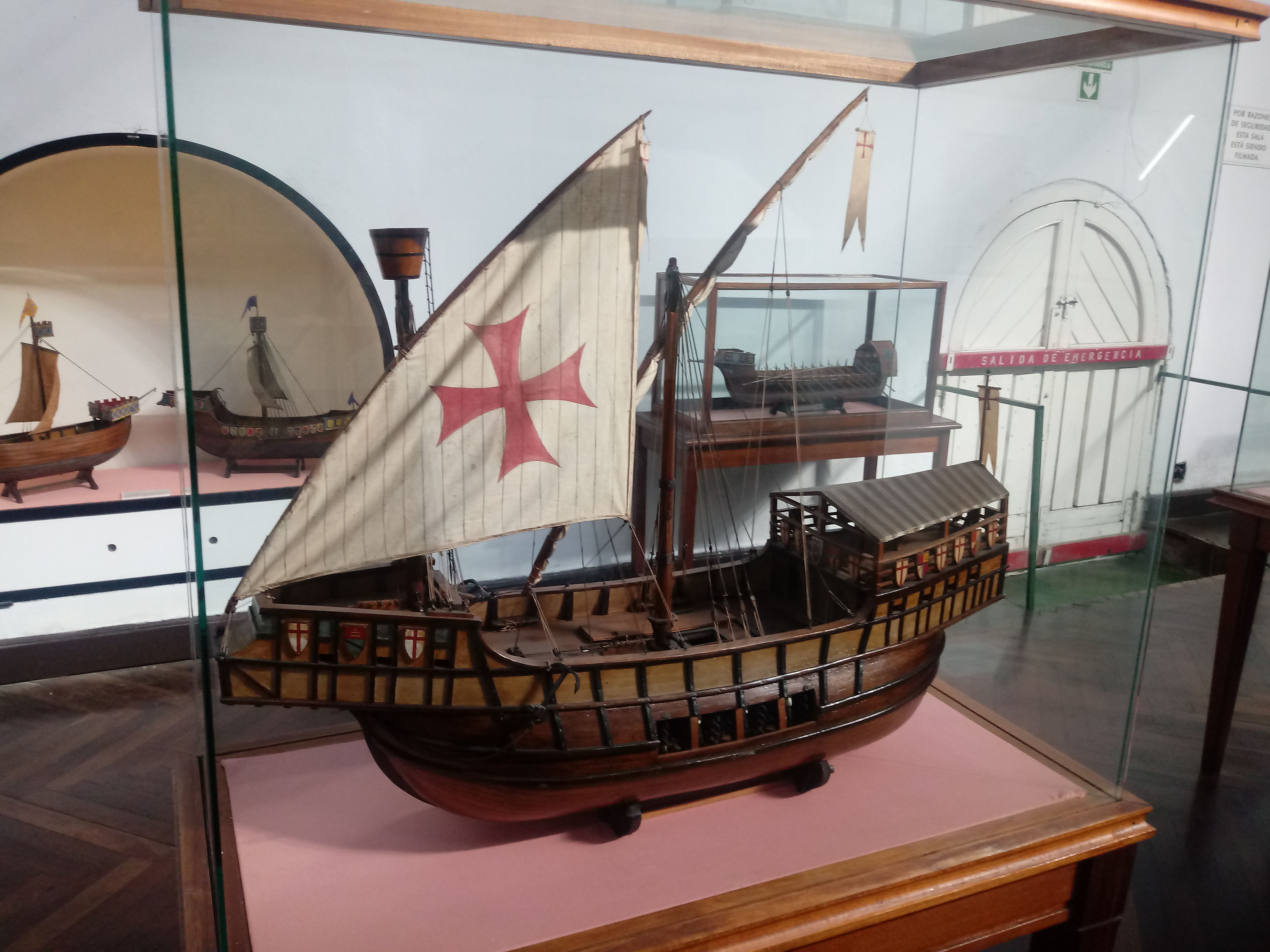 Modelo a escala de un buque medieval